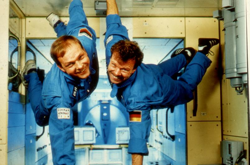 Aus dem Archiv: Im Oktober 1995 begann für Hans Schlegel (links) und Reinhold Ewald das Training für die Mission MIR'97. Trainingsorte waren das Astronautentrainingszentrum des DLR in Köln, in dessen MIR Trainingseinheit das Foto aufgenommen wurde, und das Jurij A.Gagarin Kosmonautentrainingszentrum ZPK im Sternenstädtchen bei Moskau. Während in Köln die Experimente vorgestellt und trainiert wurden, dienten die l:l-Simulatoren von Sojus-Kapsel und MIR-Raumstation im ZPK zum Training der Flugphasen und des Aufenthalts an Bord. Credit: DLR (CC-BY 3.0)